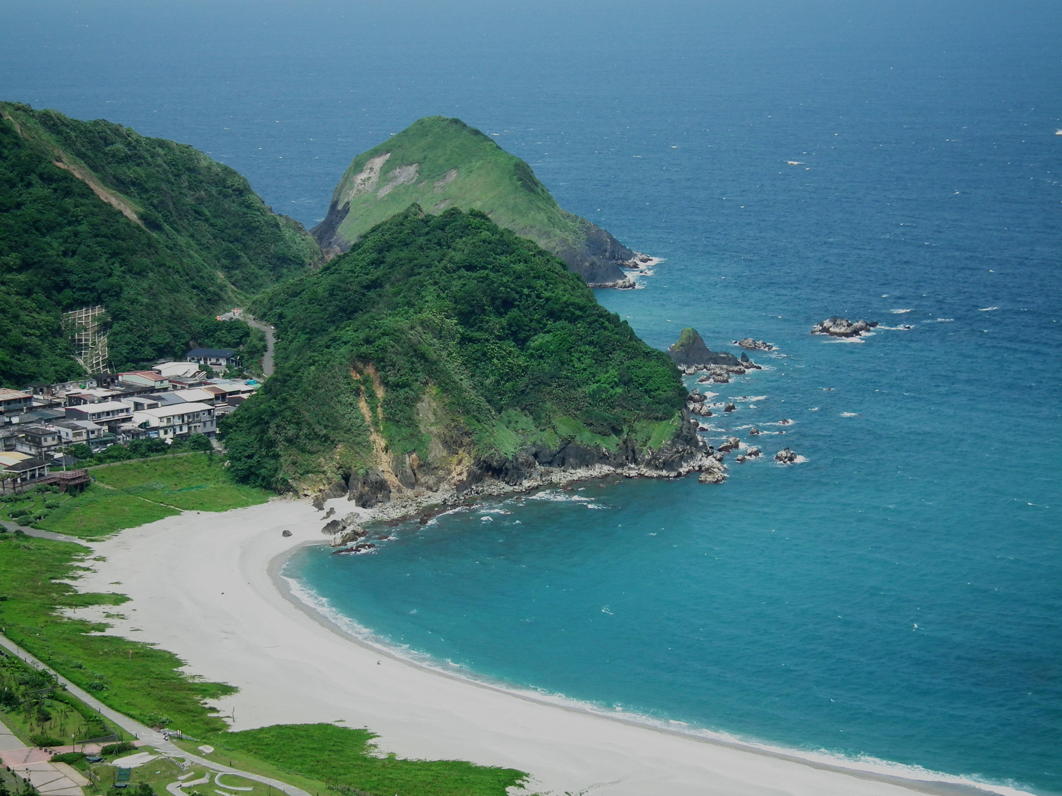 內埤海灘 Neipi Coast, Suao